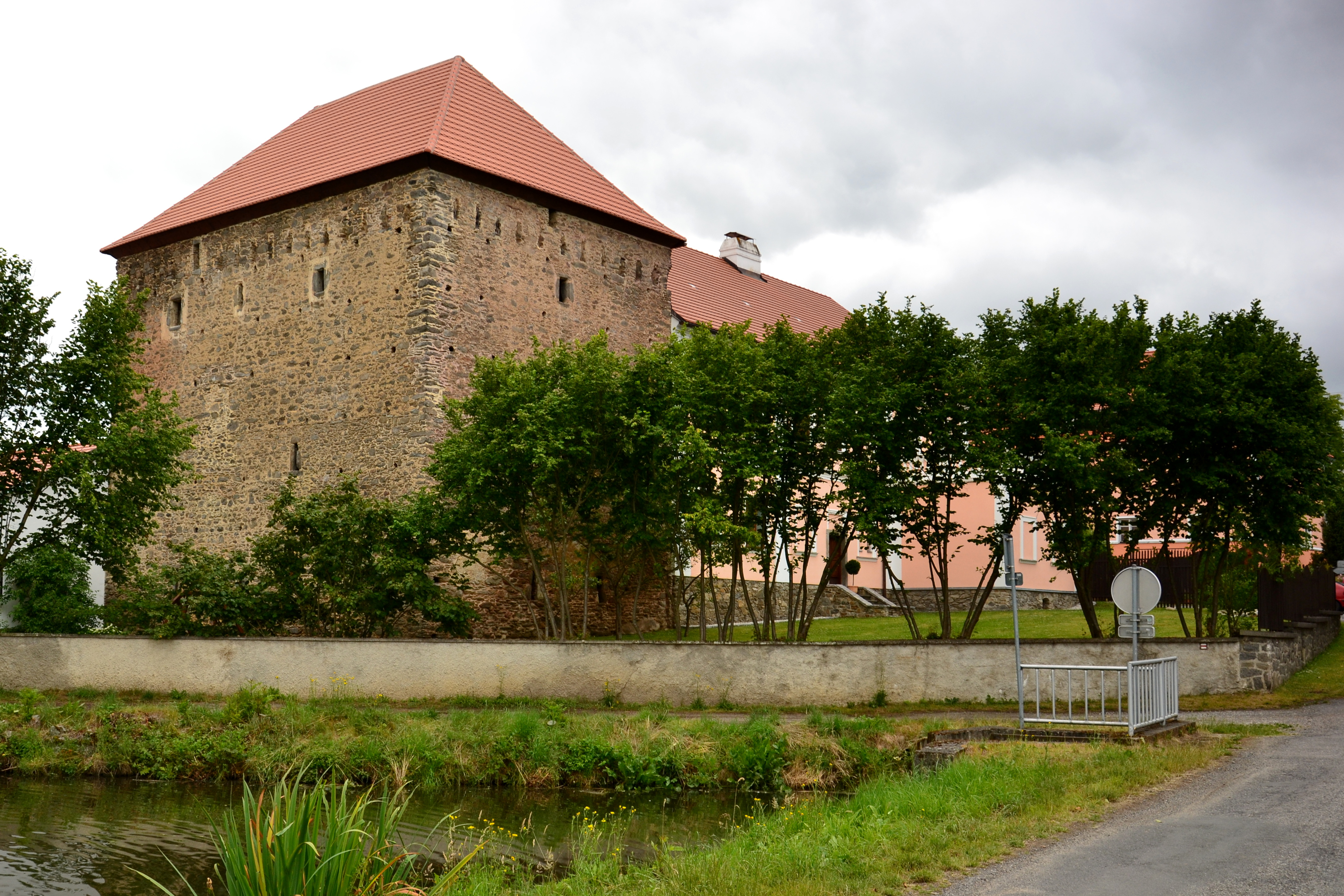 Tvrz, Svojšice 11, Svojšice (Petrovice u Sušice).